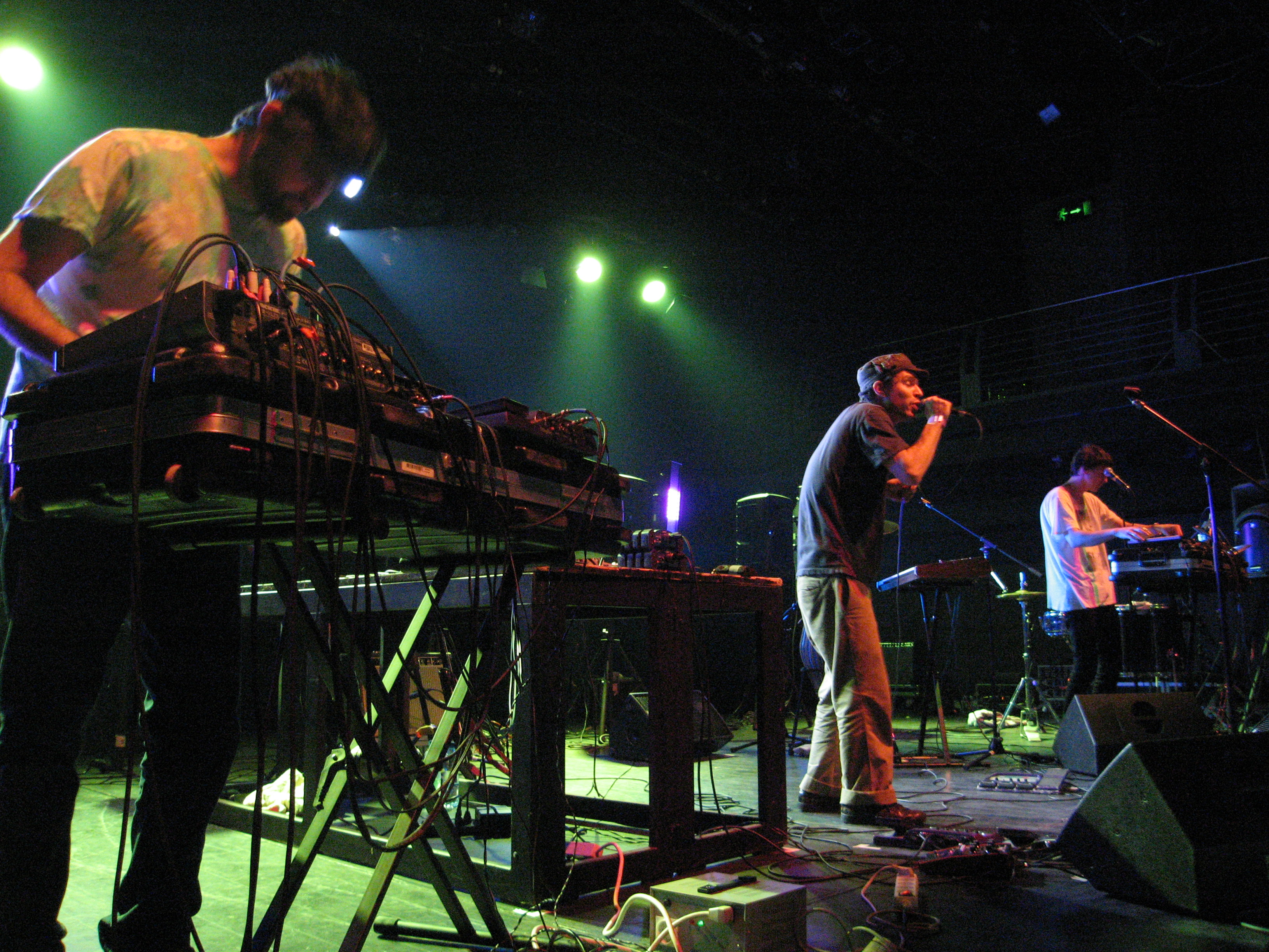 Concert à Prague en 2008